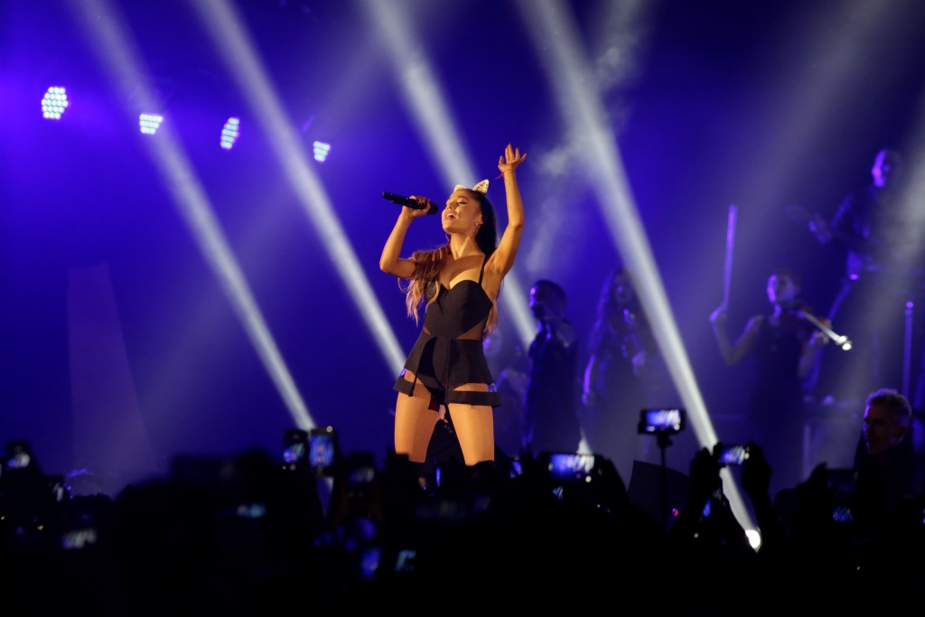 Imagen de la cantante Ariana Grande durante la gira The Honeymoon Tour en su paso por Jakarta (2015).